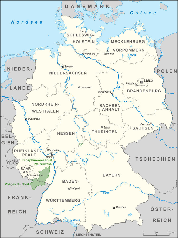 Karte des Biosphärenreservates Pfälzerwald-Vosges du Nord in Deutschland